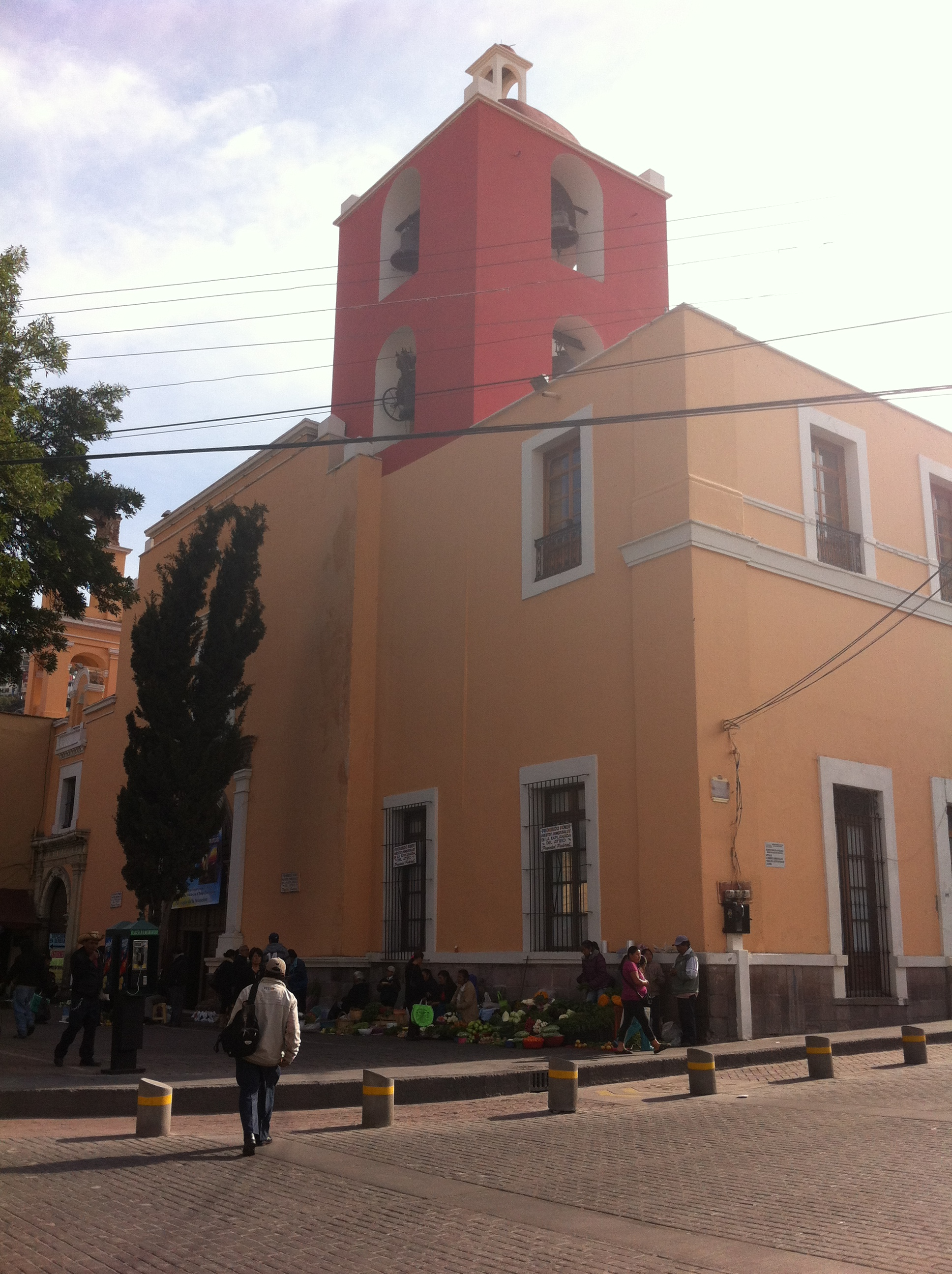 Parroquia de la Asunción